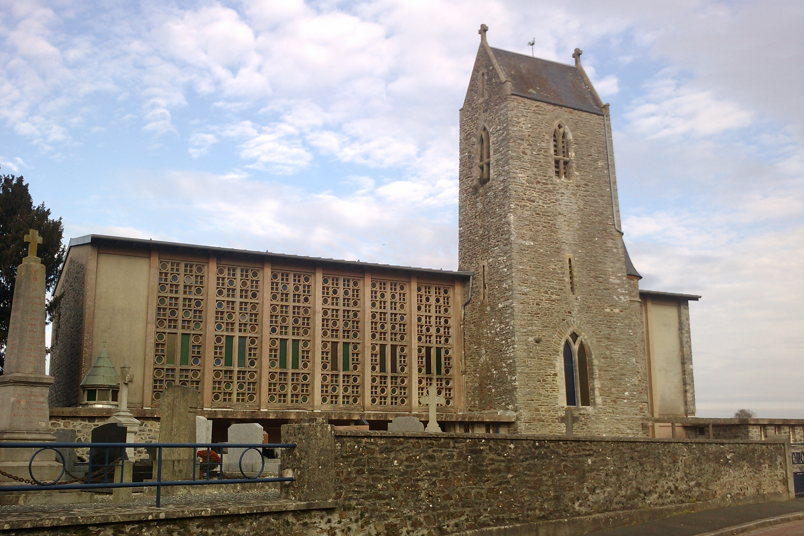 Église Saint-Pierre de Villiers-Fossard.